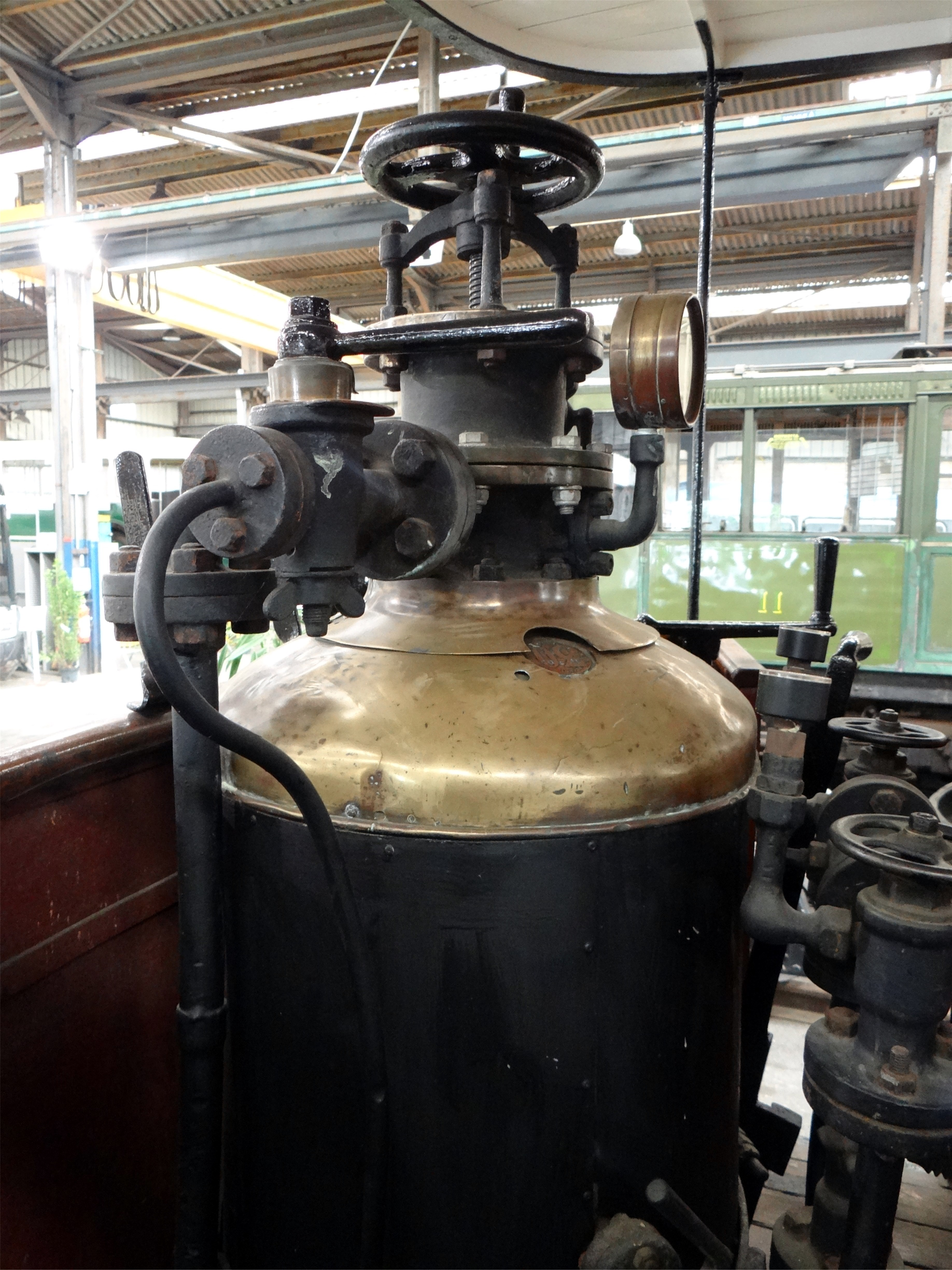 Partie avant de la motrice système Mékarski à air comprimé N° 18 de 1879 (seule exemplaire de ce type conservé au monde) - Réseau de Nantes. Musée des transports urbains, interurbains et ruraux, Chelles, Seine-et-Marne, France.